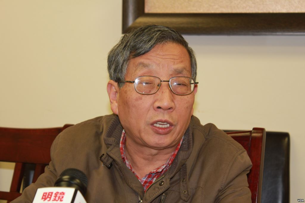 《北京之春》榮譽主編胡平出席紀念胡耀邦誕辰100周年討論會。